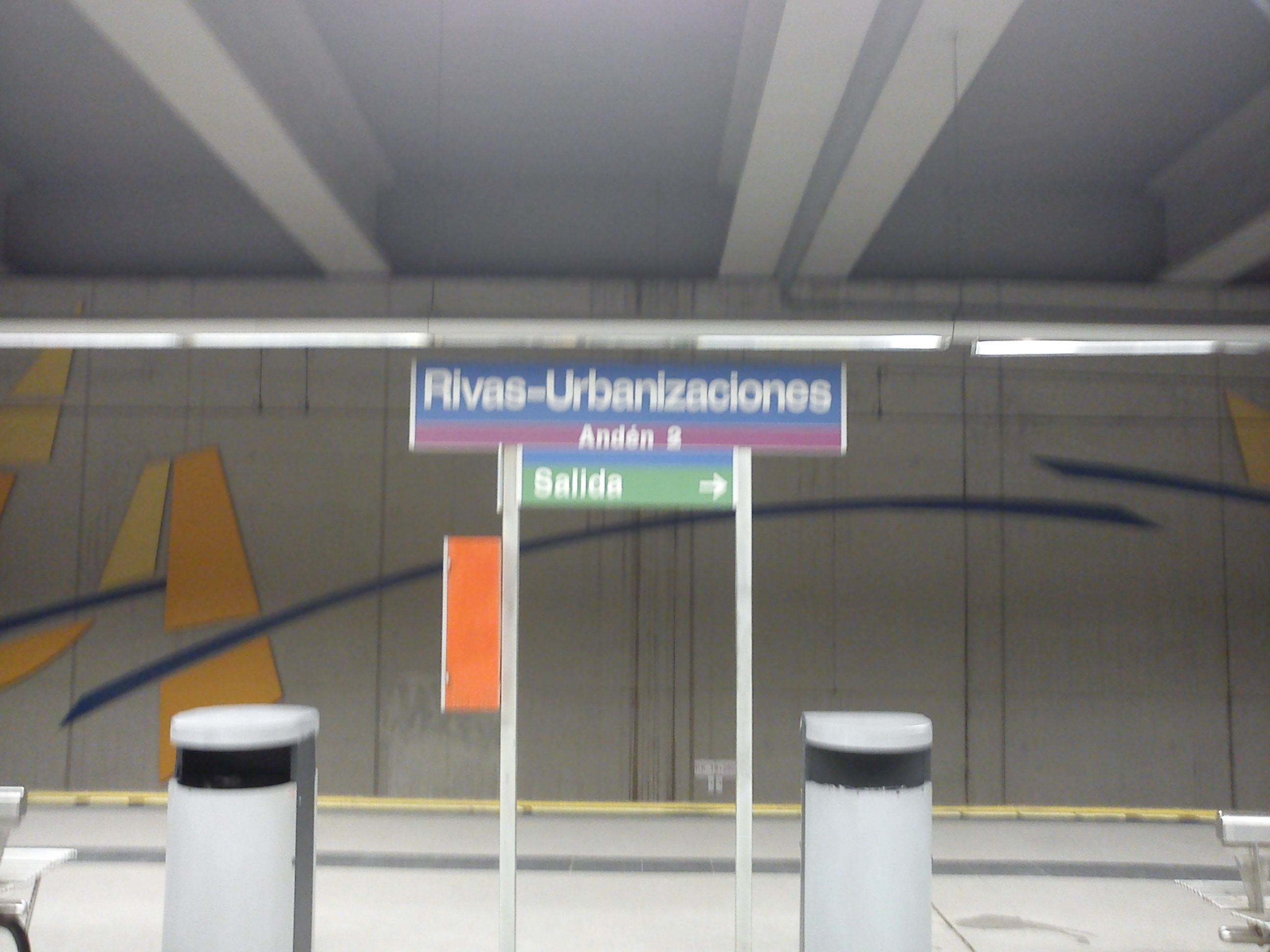 Estación de Rivas-Urbanizaciones